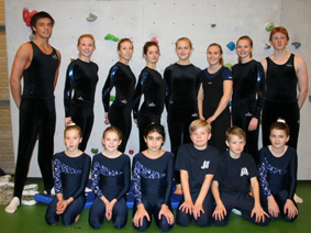 Troppsgymnastikk